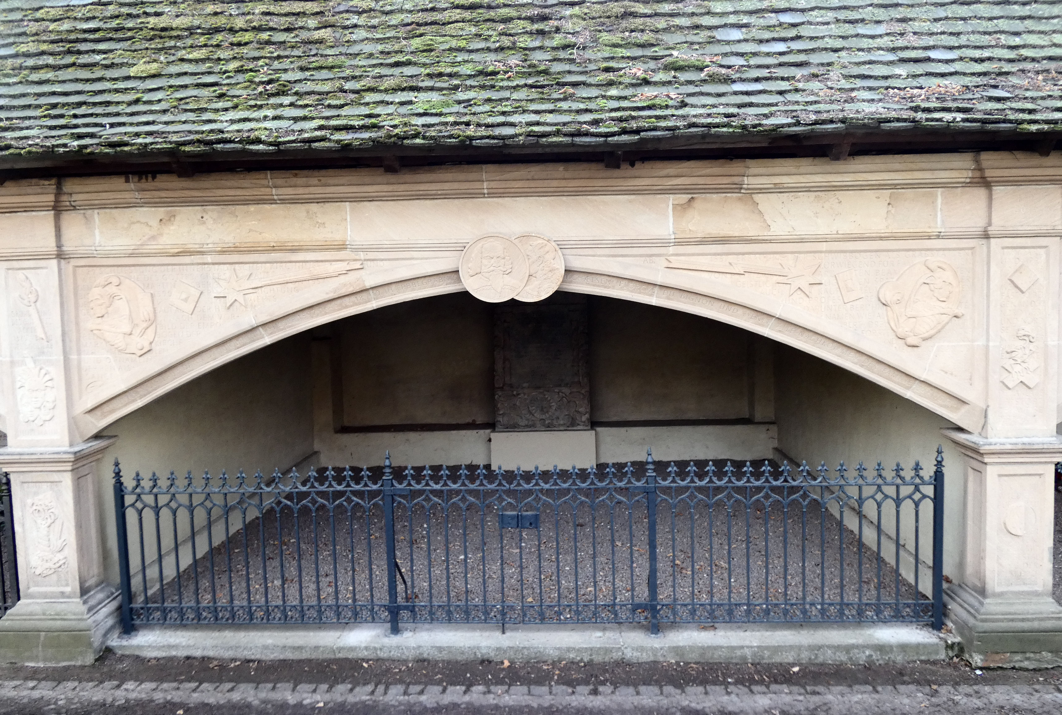 Stadtgottesacker Halle, Bogen 65, Grabstätte von Bruno Stisser und von sechs Generationen von Nachfahren der Familie Händel